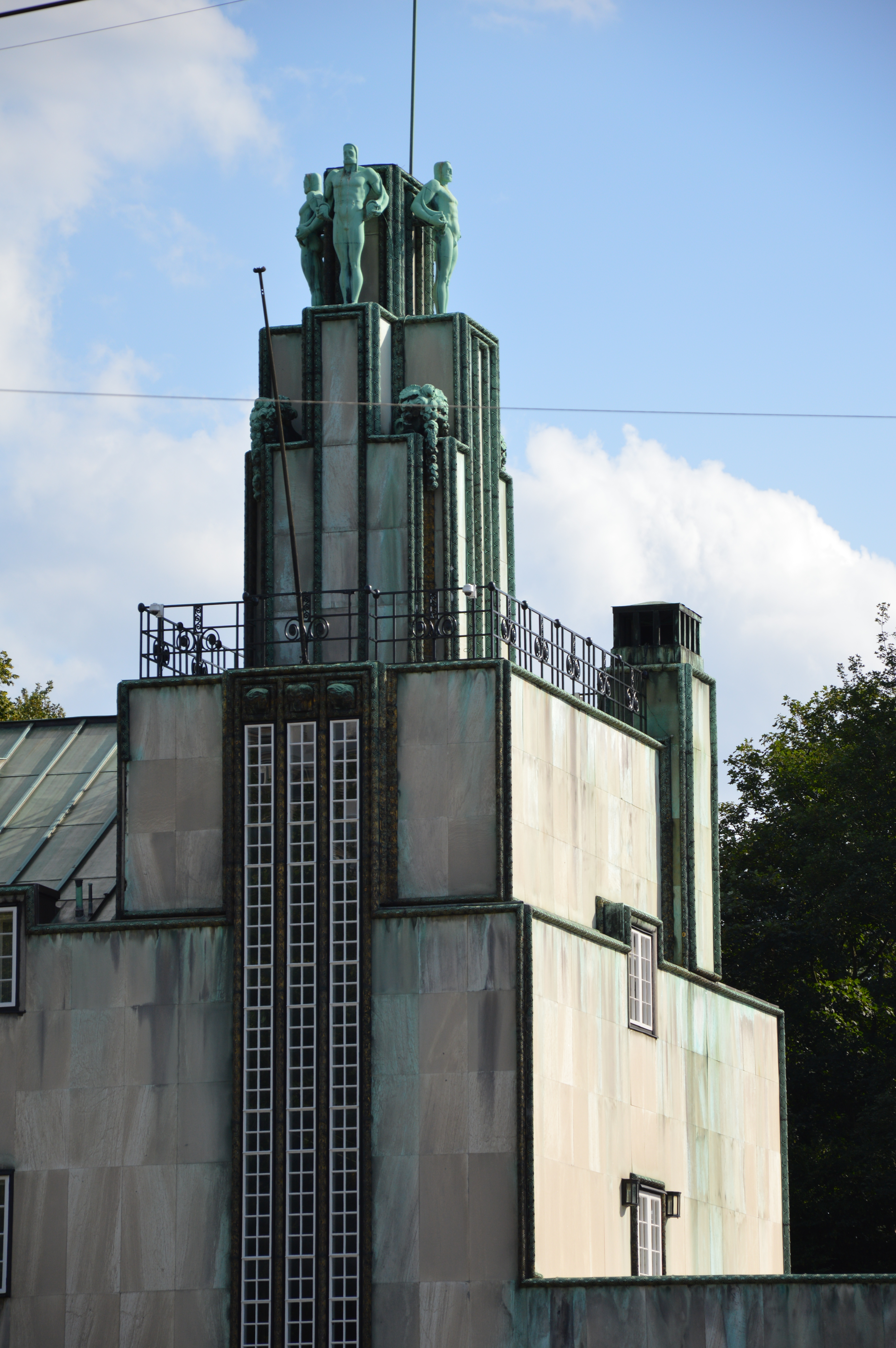 Palais Stoclet, avenue de Tervuren, n° 279/281 à Woluwé-Saint-Pierre.